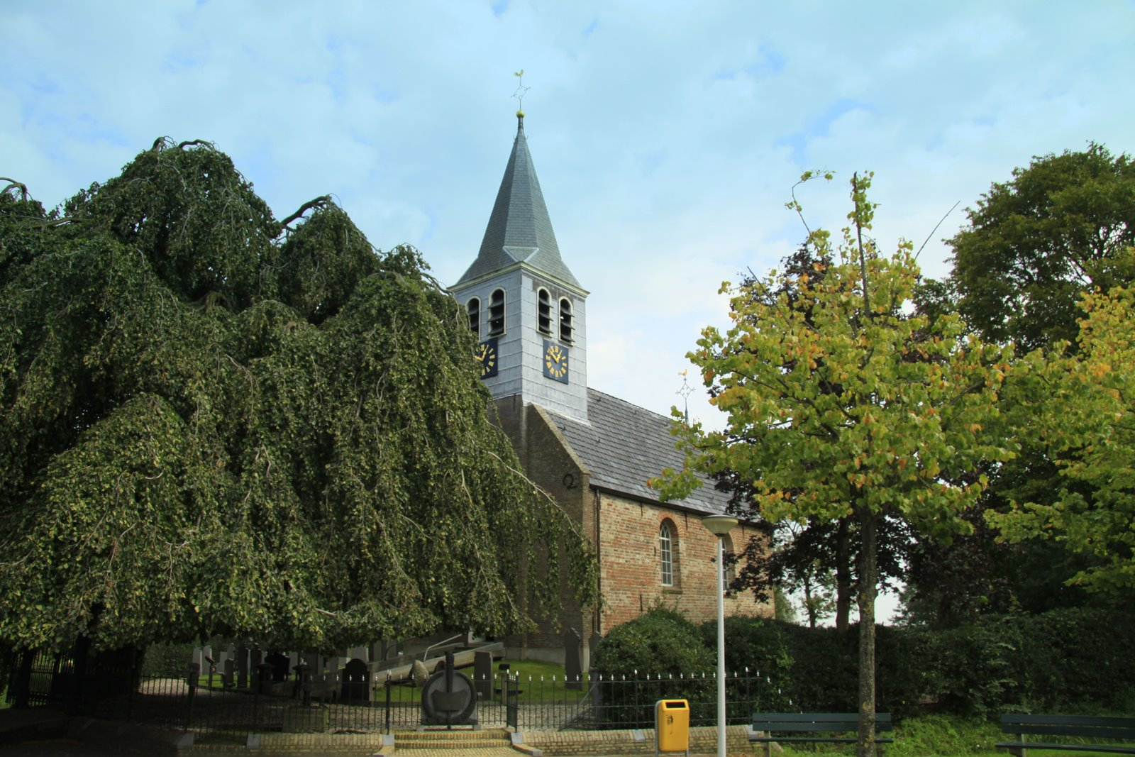 De Hervormde kerk van Ouwsterhaule in de Gemeente Skasterlân in Fryslân